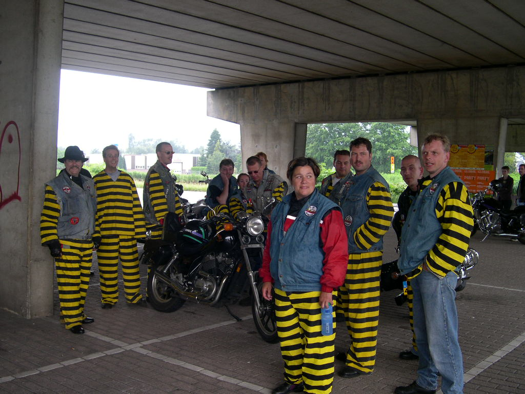 Toestemming van WeertFM